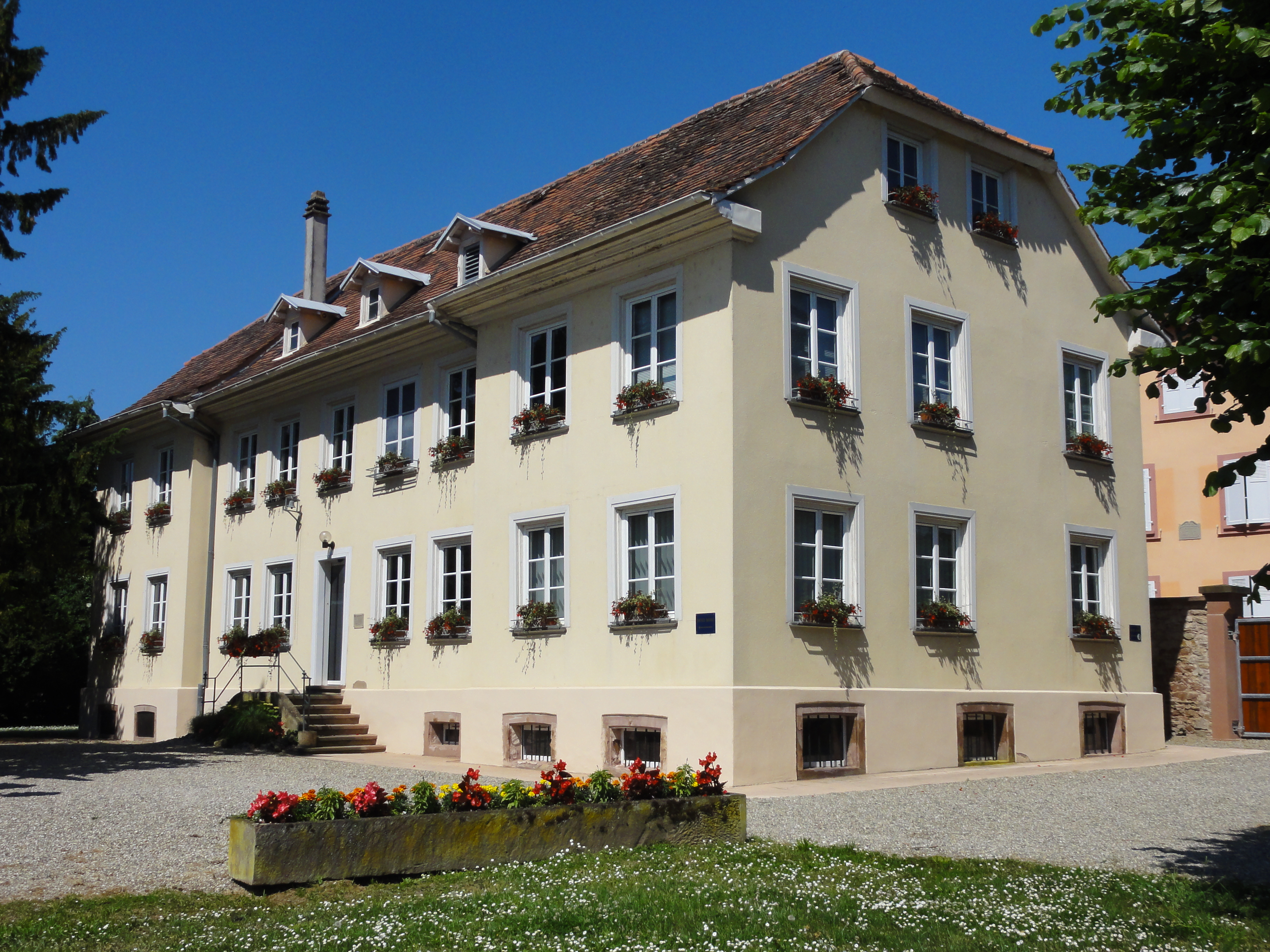 Alsace, Bas-Rhin, Oberschaeffolsheim, Mairie, ancien château (XVIIIe). .